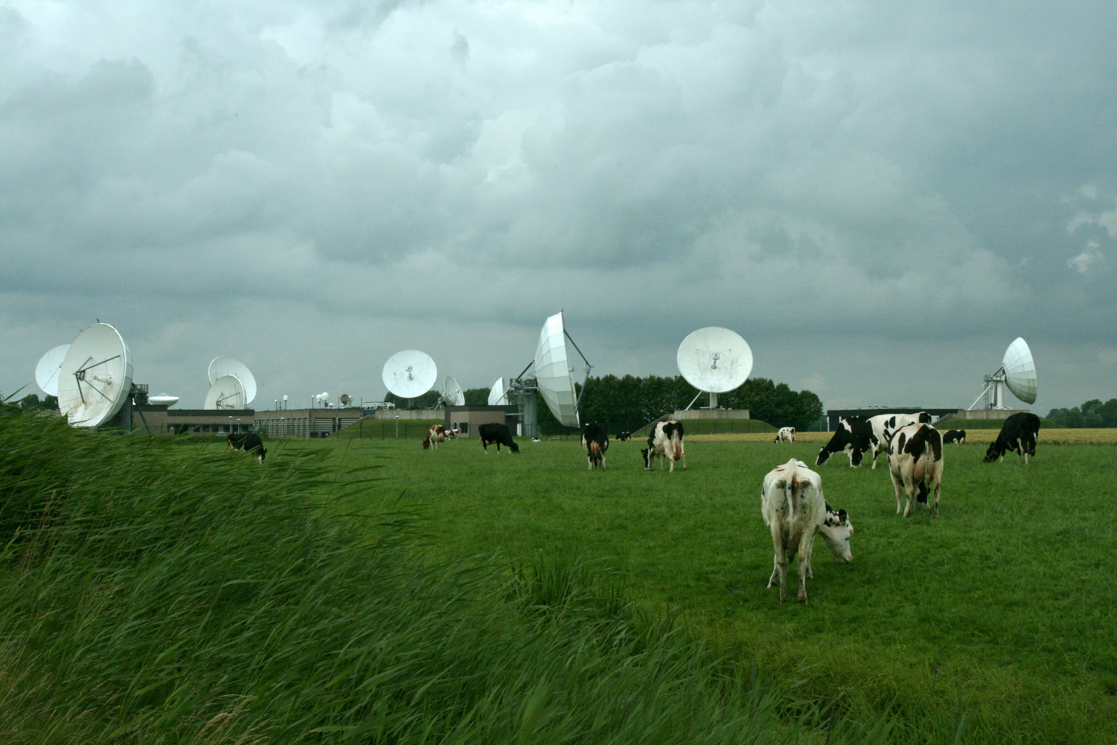 It Greate Ear tussen de koeien. Zichtbaar zijn een aantal gebouwen van de Nationale SIGINT Organisatie